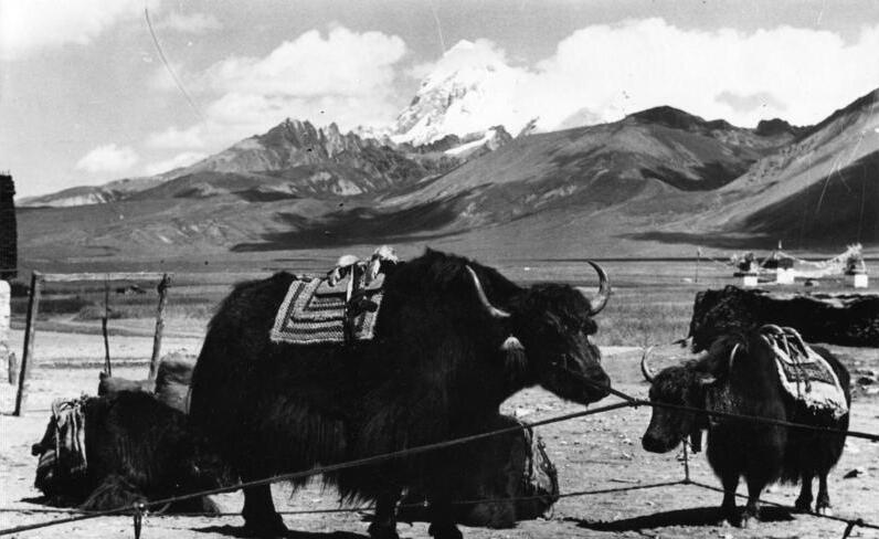 Phari, Haustiere, Yaks